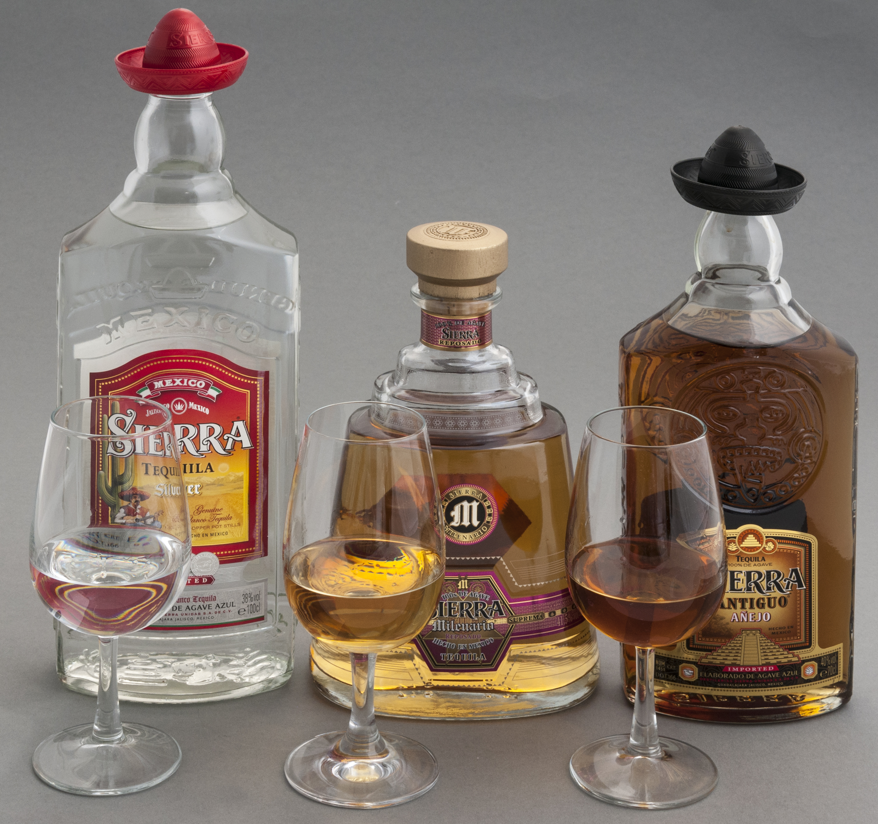 3 Sorten Sierra Tequila